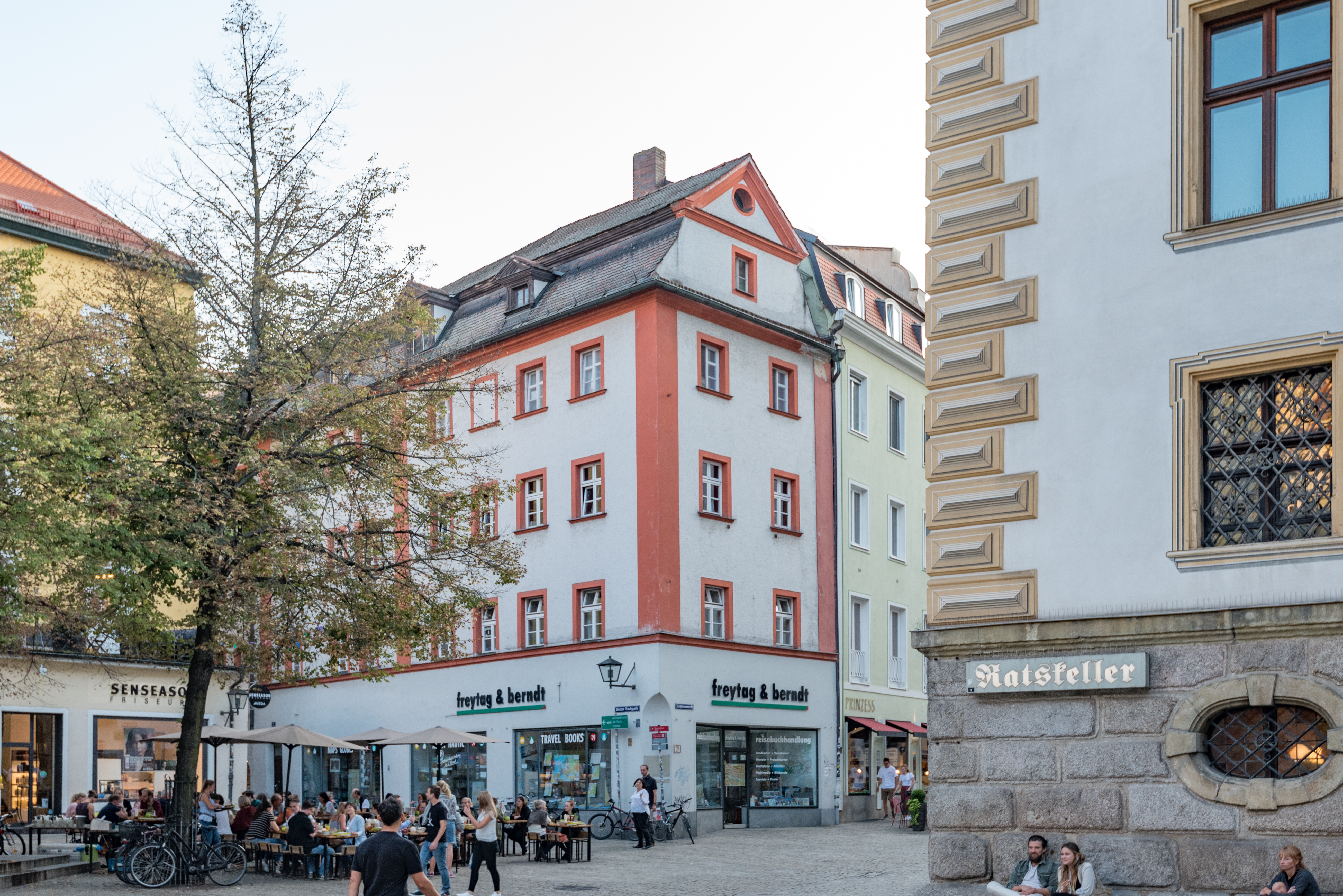 Regensburg, Kohlenmarkt 1